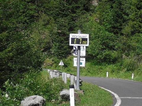 Die Anzeigetafel an der Verkehrsampel an den Malta-Hochalmstraße in Kärnten, Österreich